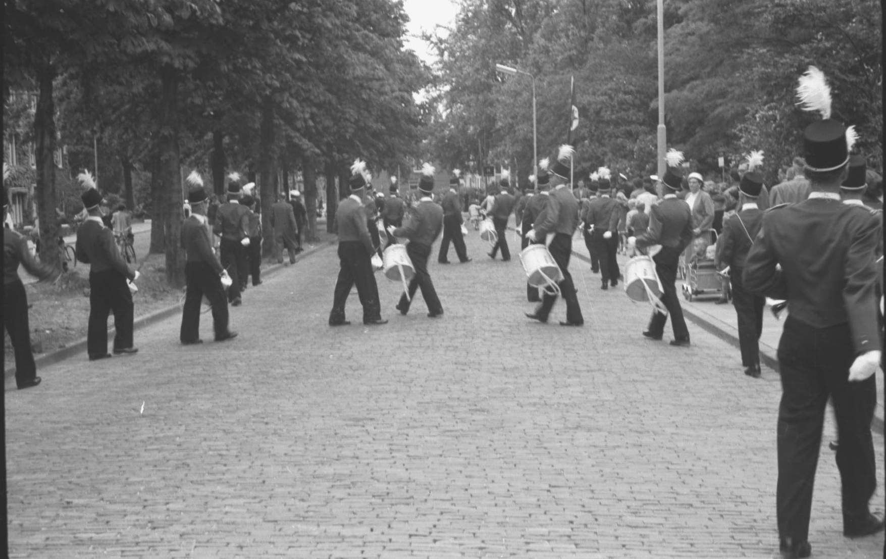 De eerste showmarsen van Ahoy